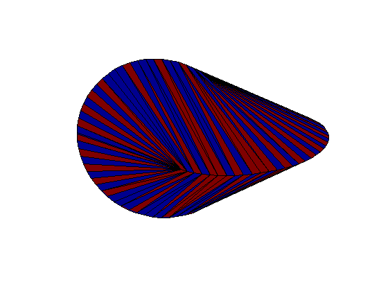 Cuerpo geométrico